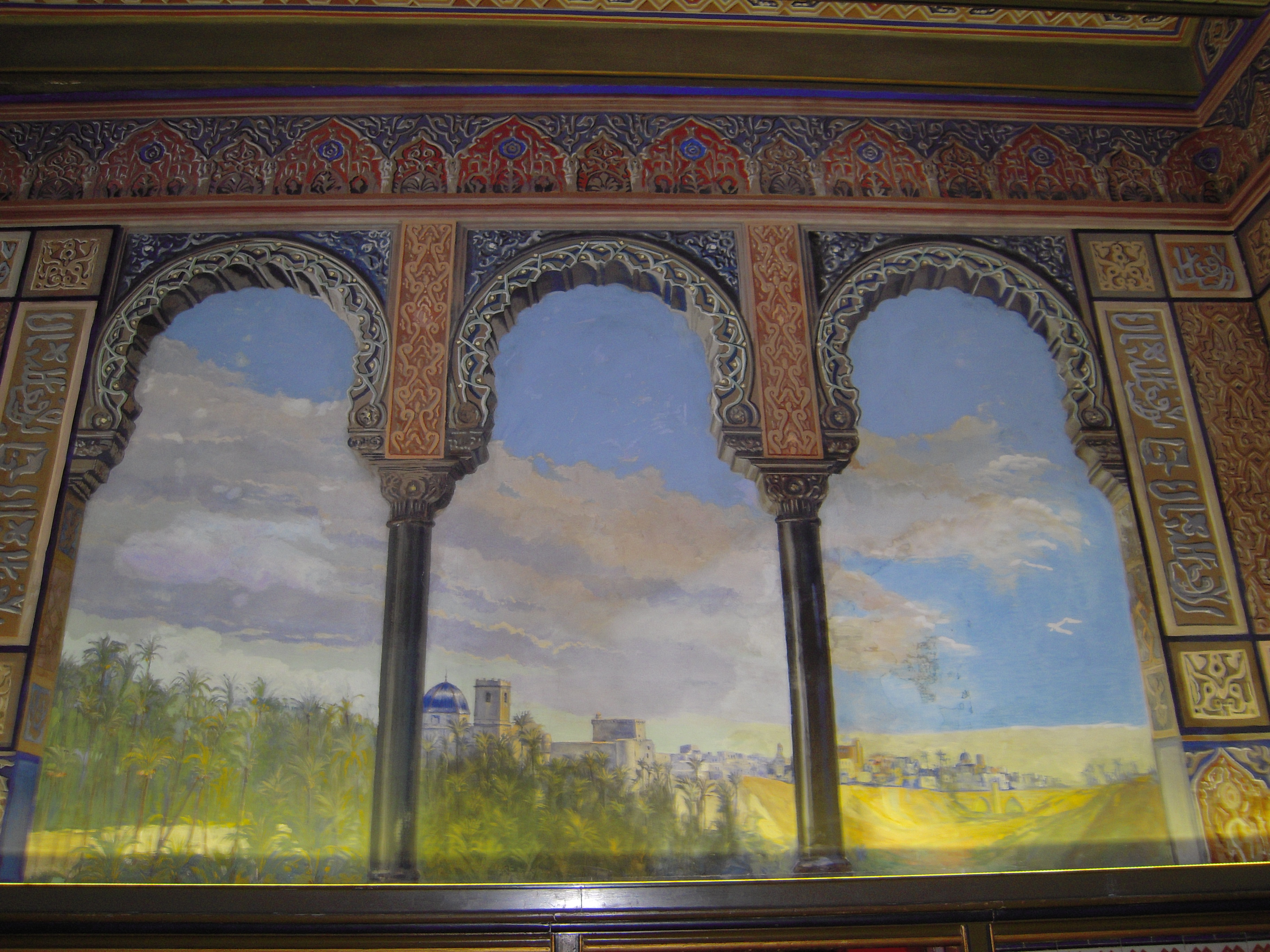 Sala Nazarí con vistas de la ciudad de Elche en 1909